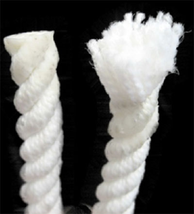 Prinzip des Heatsetting-Vorgangs